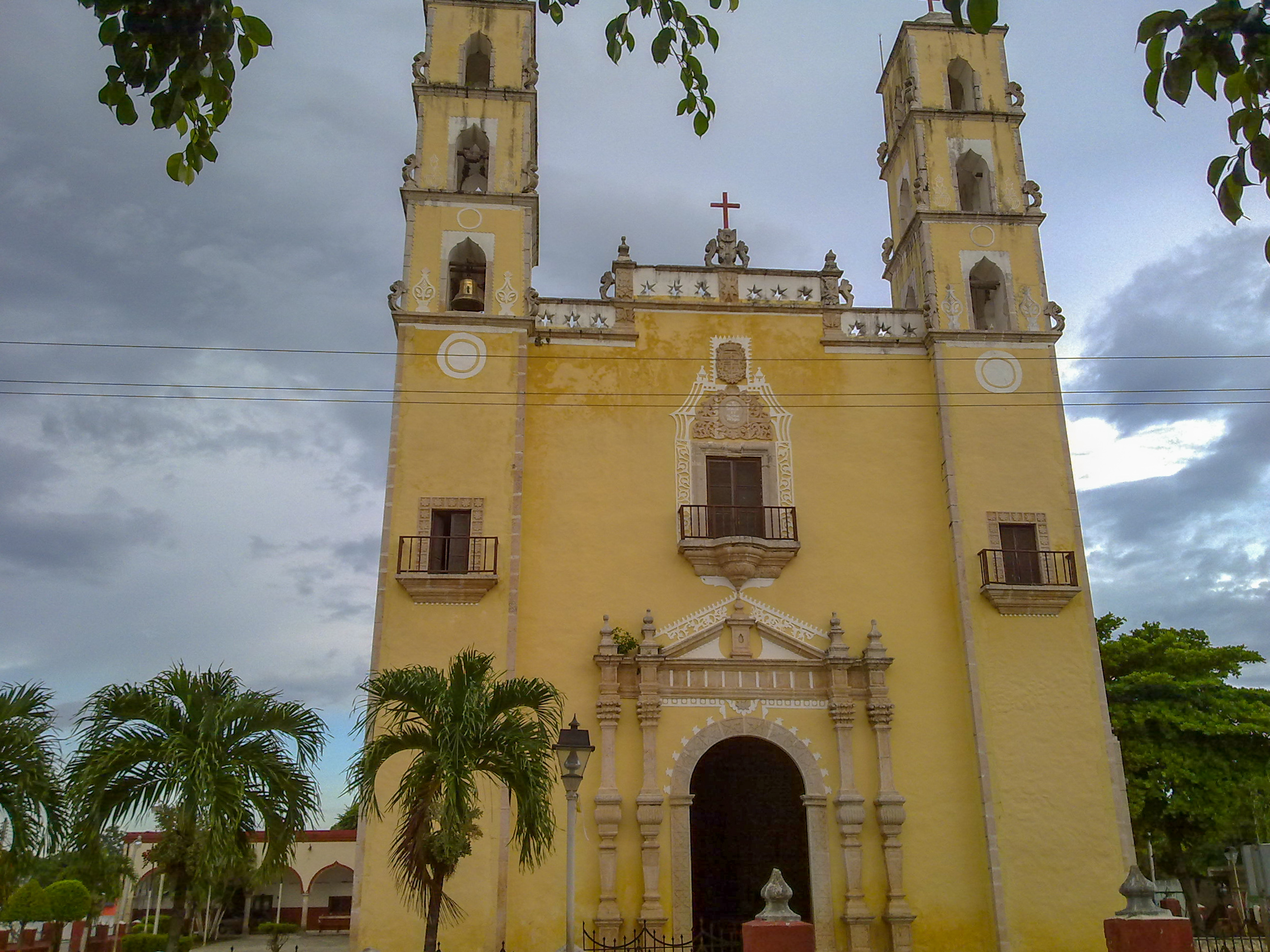 Iglesia de San Antonio de Padua, Chemax, Yucatán.